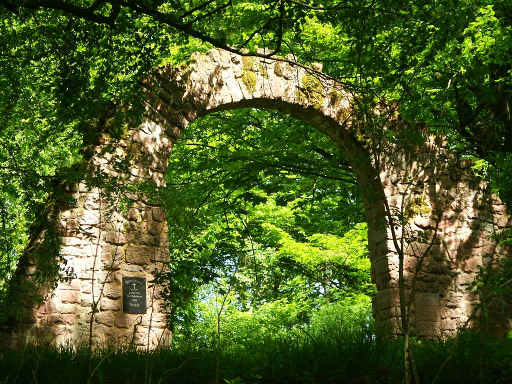 altes Eingangstor zum ehemaligen Burghof der Burgruine Blumenstein